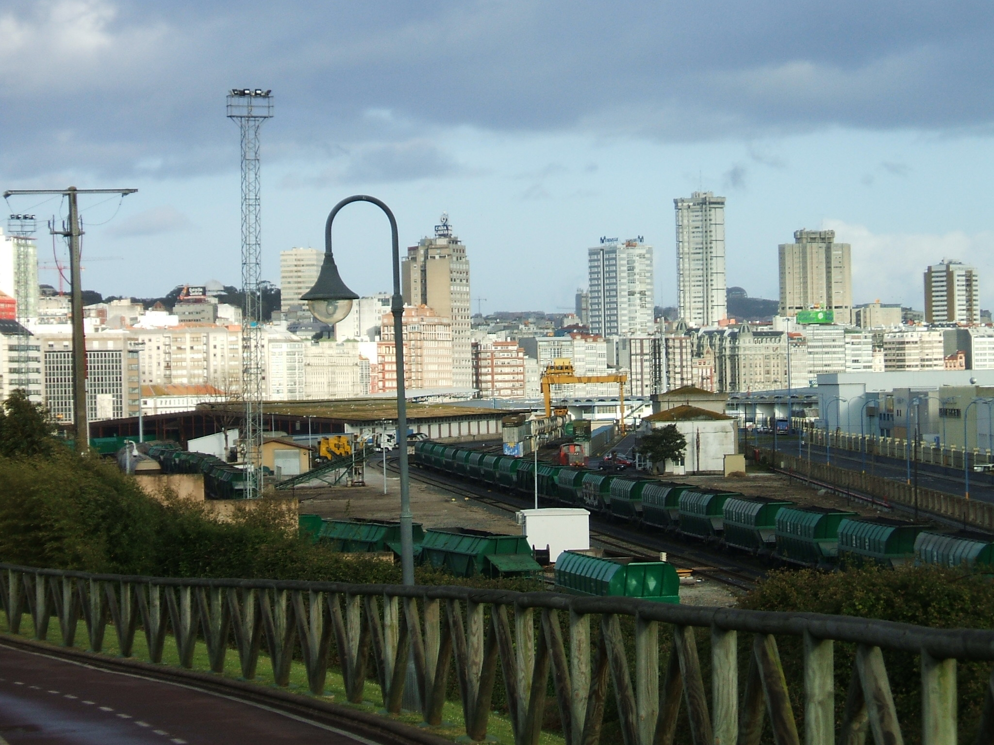 Estación de San Diego, A Coruña.